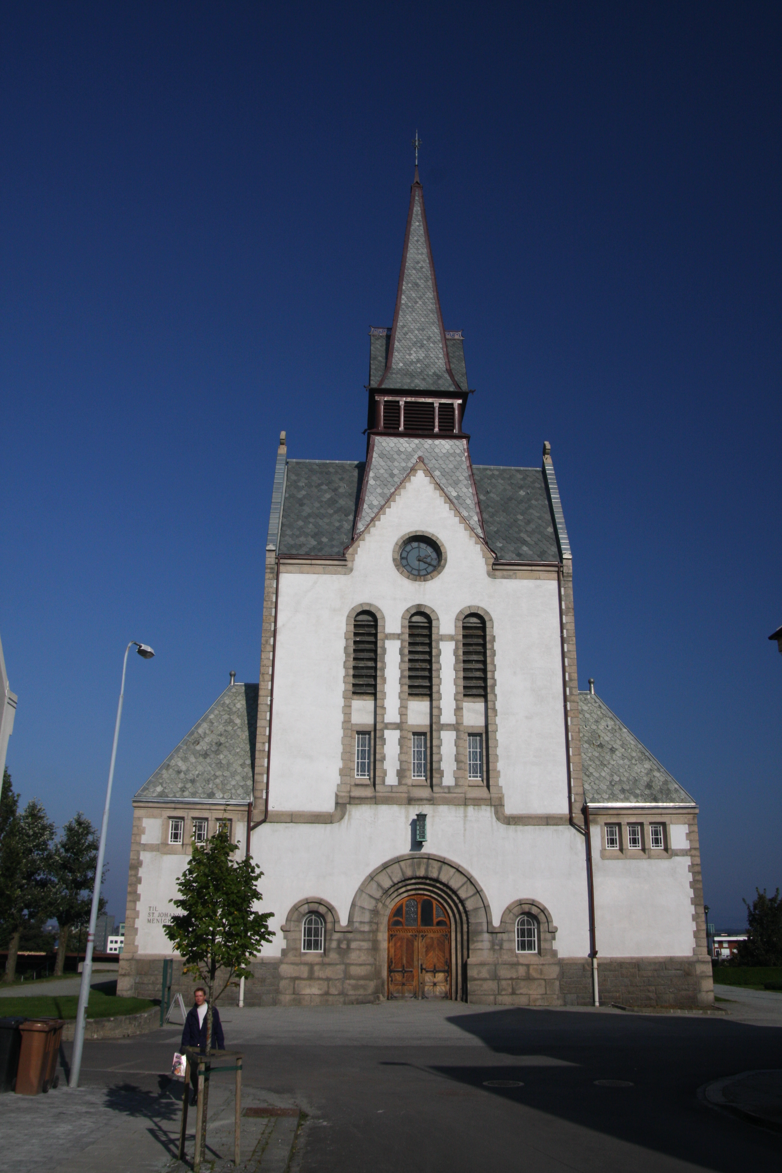 St. johannes kirkested